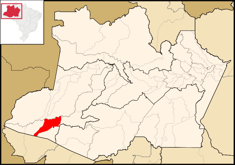 Mapa de Eirunepé